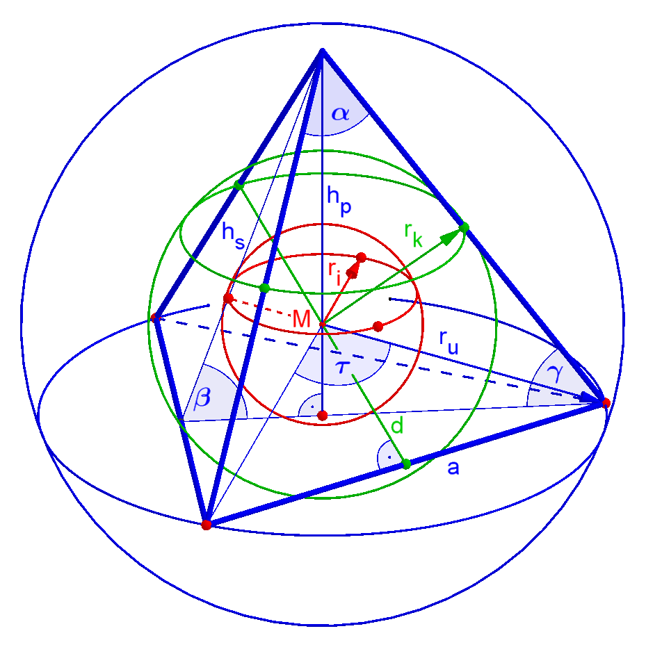 Tetraeder, Größen